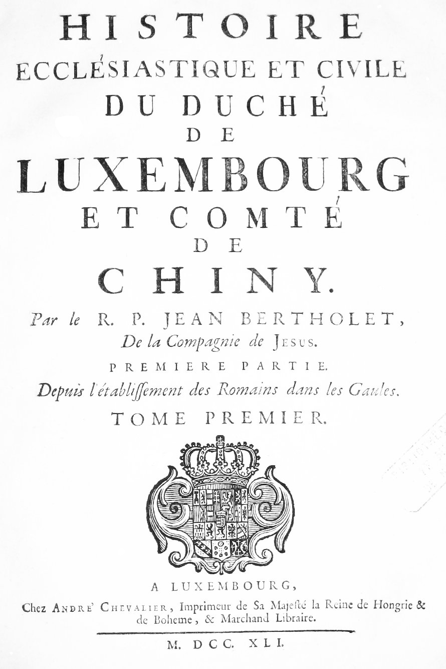 Deckbalt vum 1. Band vum Jean Bertholet senger Histoire ecclésiastique et civile du Duché de Luxembourg et Comté de Chiny.